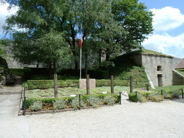 Poteaux des fusillés Citadelle de Besançon